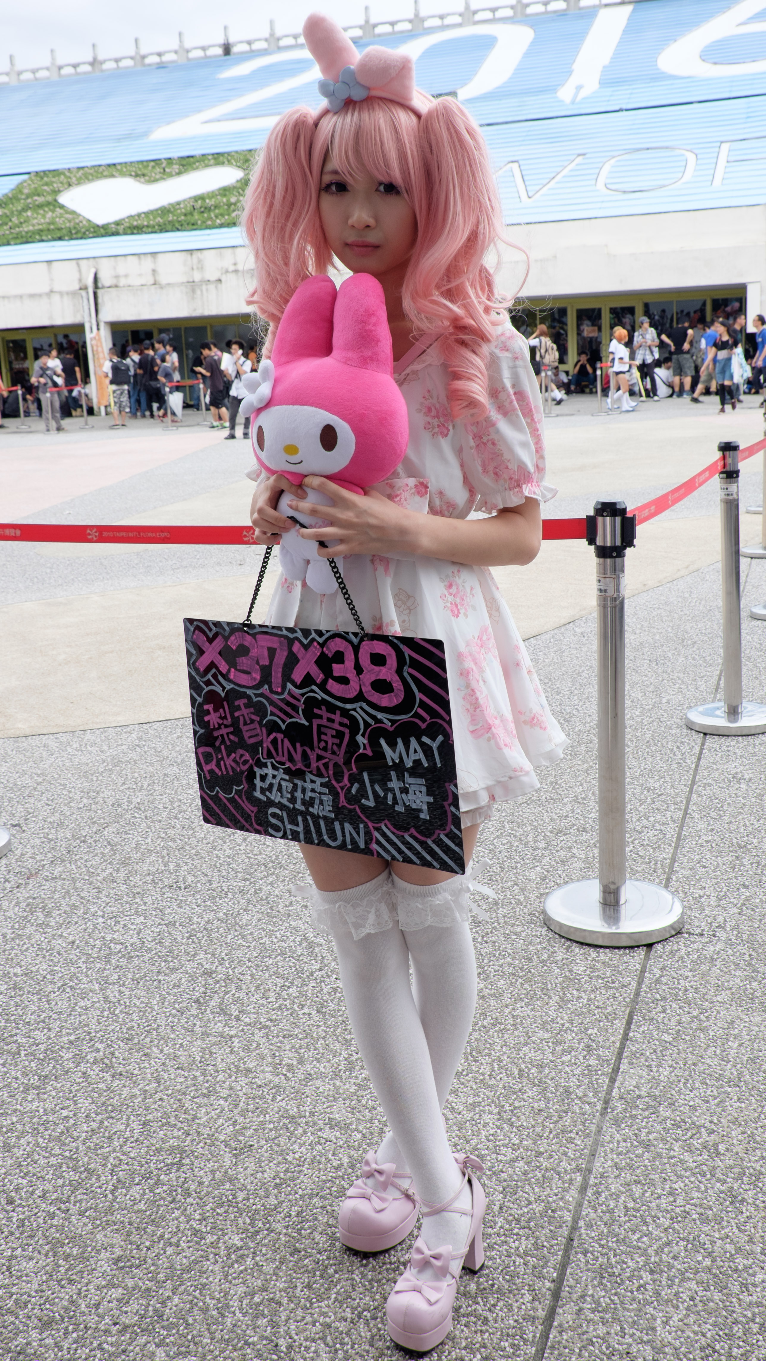 Fancy Frontier 26第一日中午，梨香 RIKA Cosplay三麗鷗My Melody。